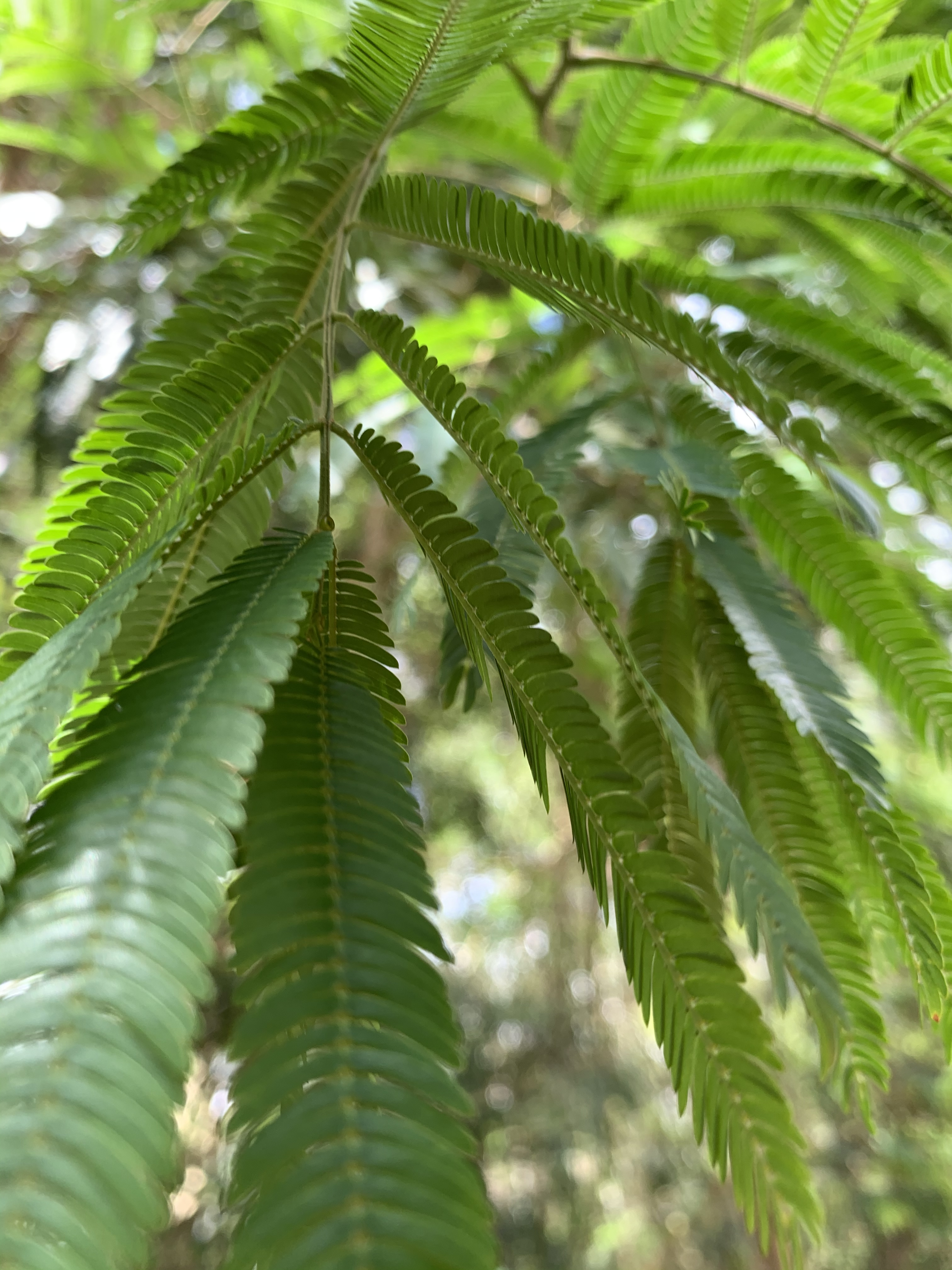 pau jacaré